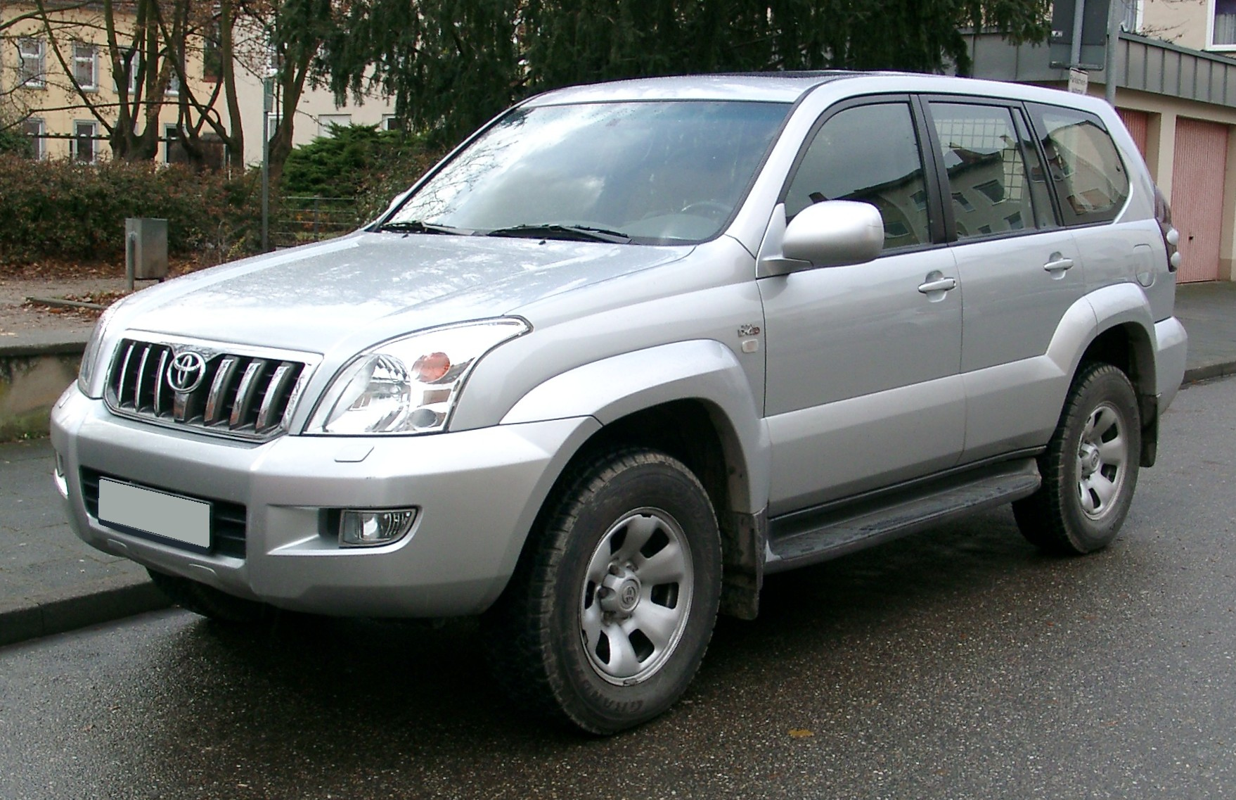 Toyota Land Cruiser Prado